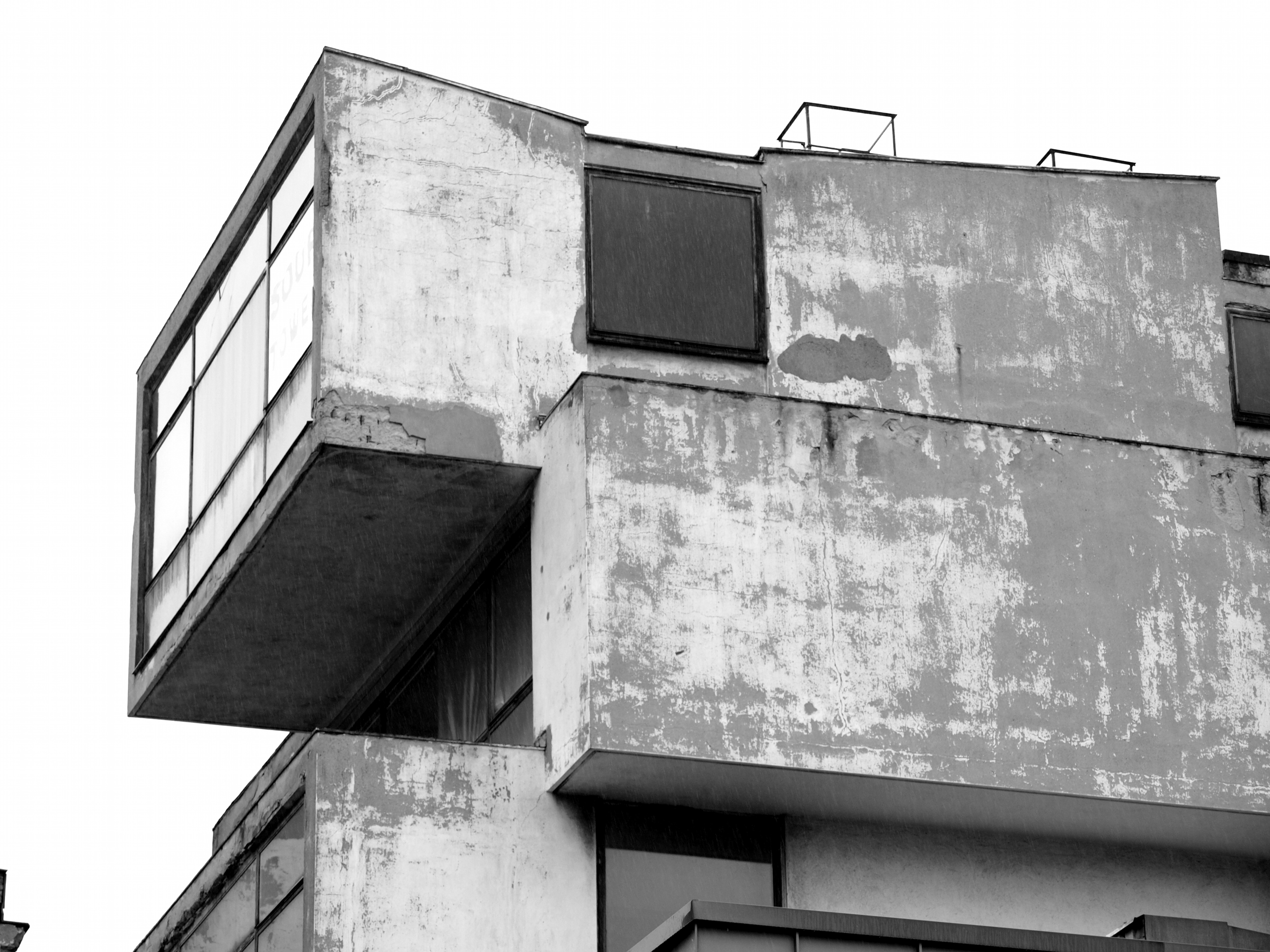 Architekturausschnitt des denkmalgeschützten Gebäudes der ehem. Rotaprint GmbH, Berlin-Wedding.